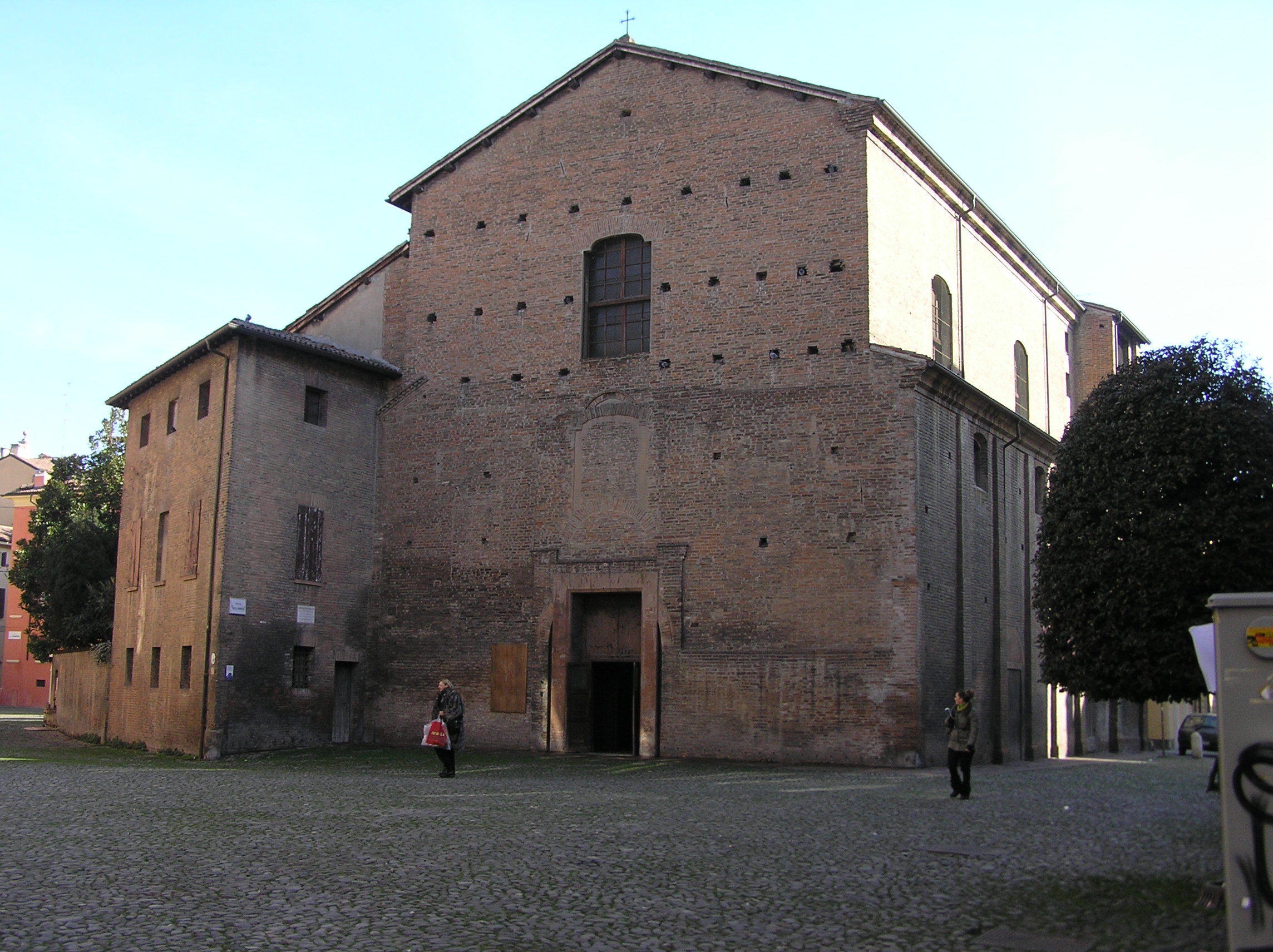 Chiesa di Santa Maria della Pomposa, a Modena, di origine medievale, rifatta tra il sei e il settecento. Conserva residui della primitiva chiesa in facciata e sul fianco.